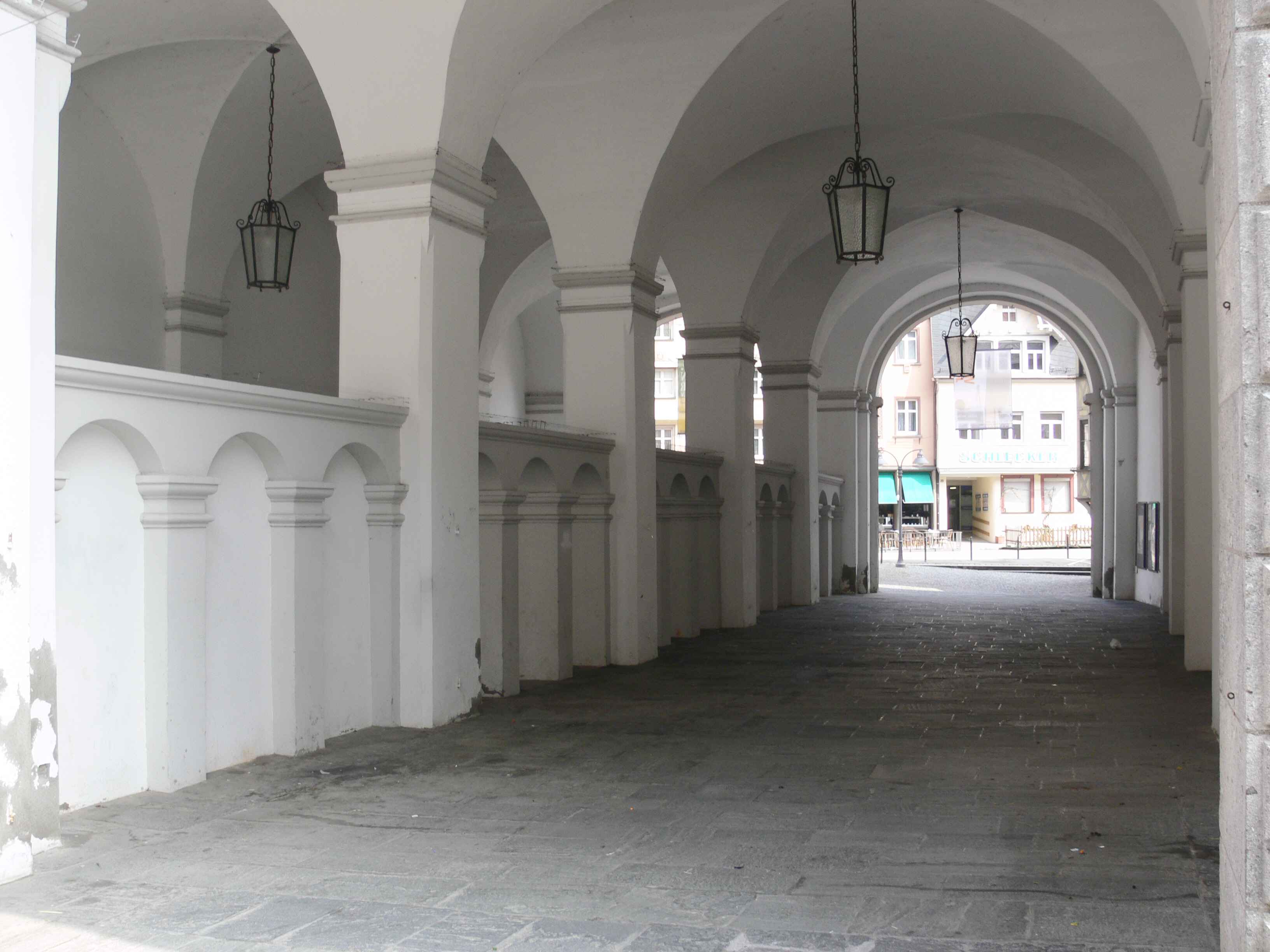 Ravensburg, Altes Theater (Brotlaube) Marktlaube (Blick von der Marktstraße Richtung Gespinstmarkt)